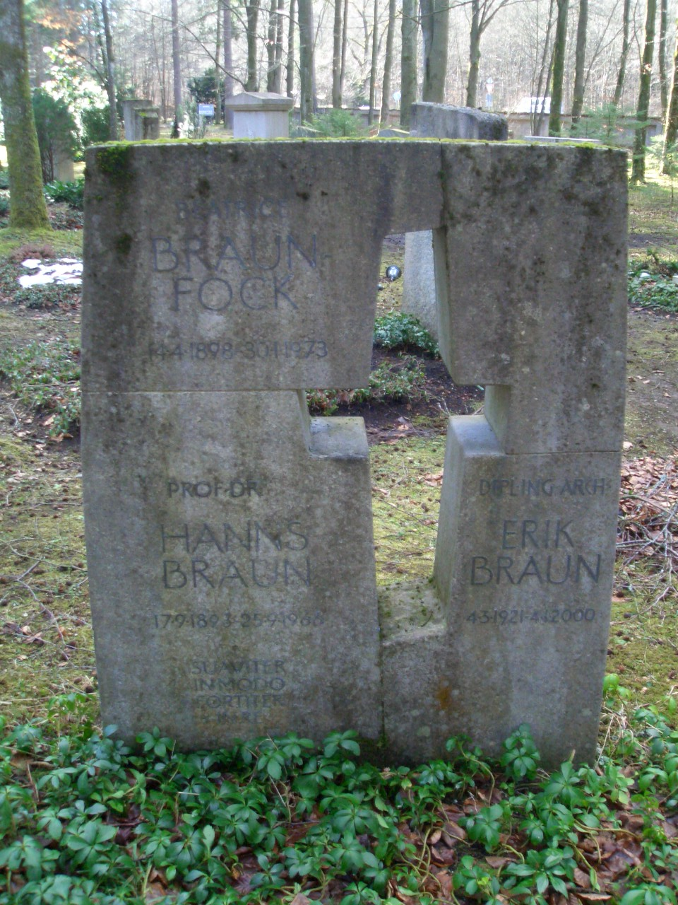 Grab der Kinderbuch-Illustratorin Beatrice Braun-Fock (Bea Fock) und des Journalisten Hanns Braun auf dem Waldfriedhof Grünwald